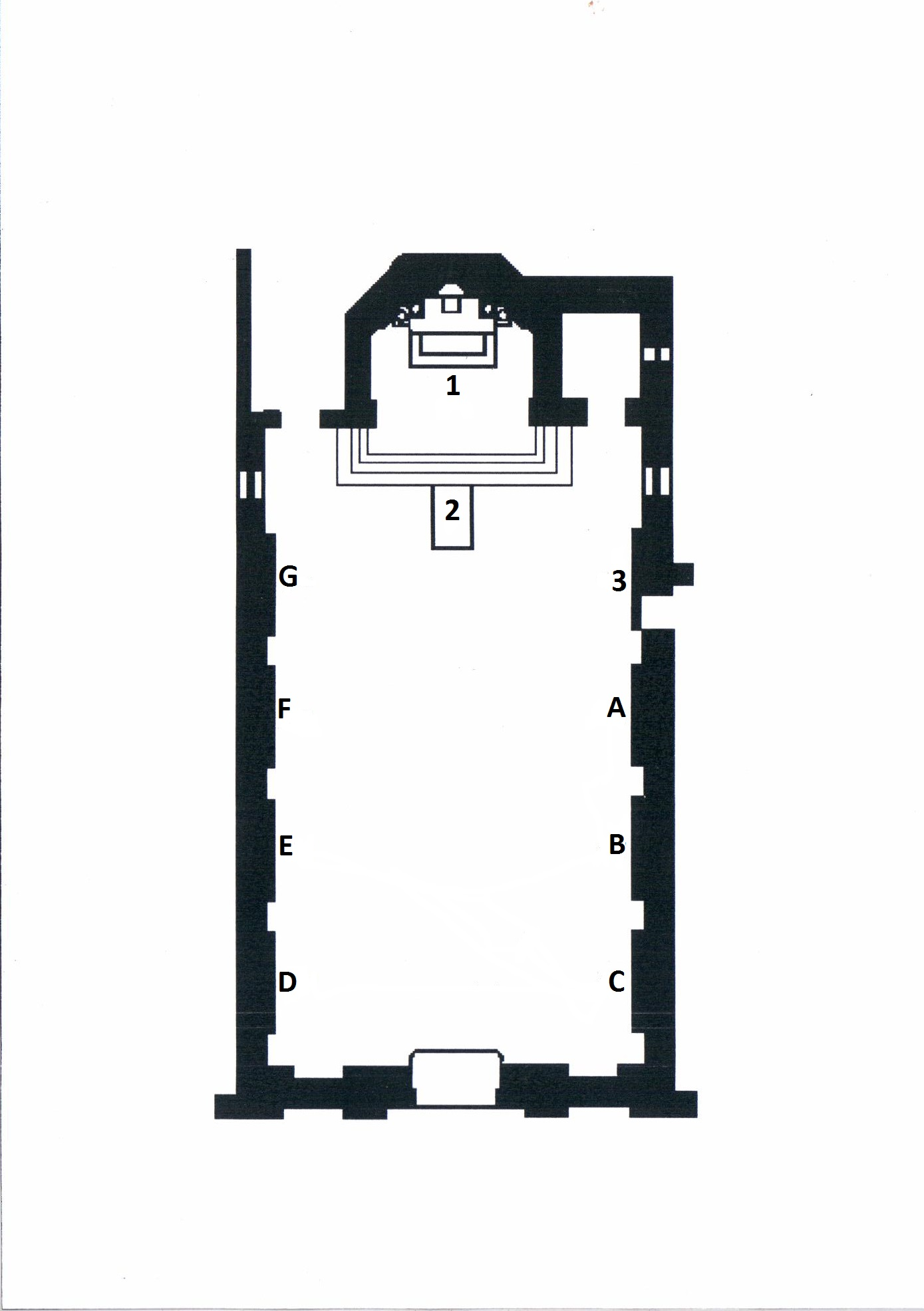 Piantina della chiesa di san Giacomo di Schio